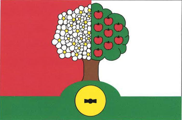 vlajka,Jablonná, okres příbram